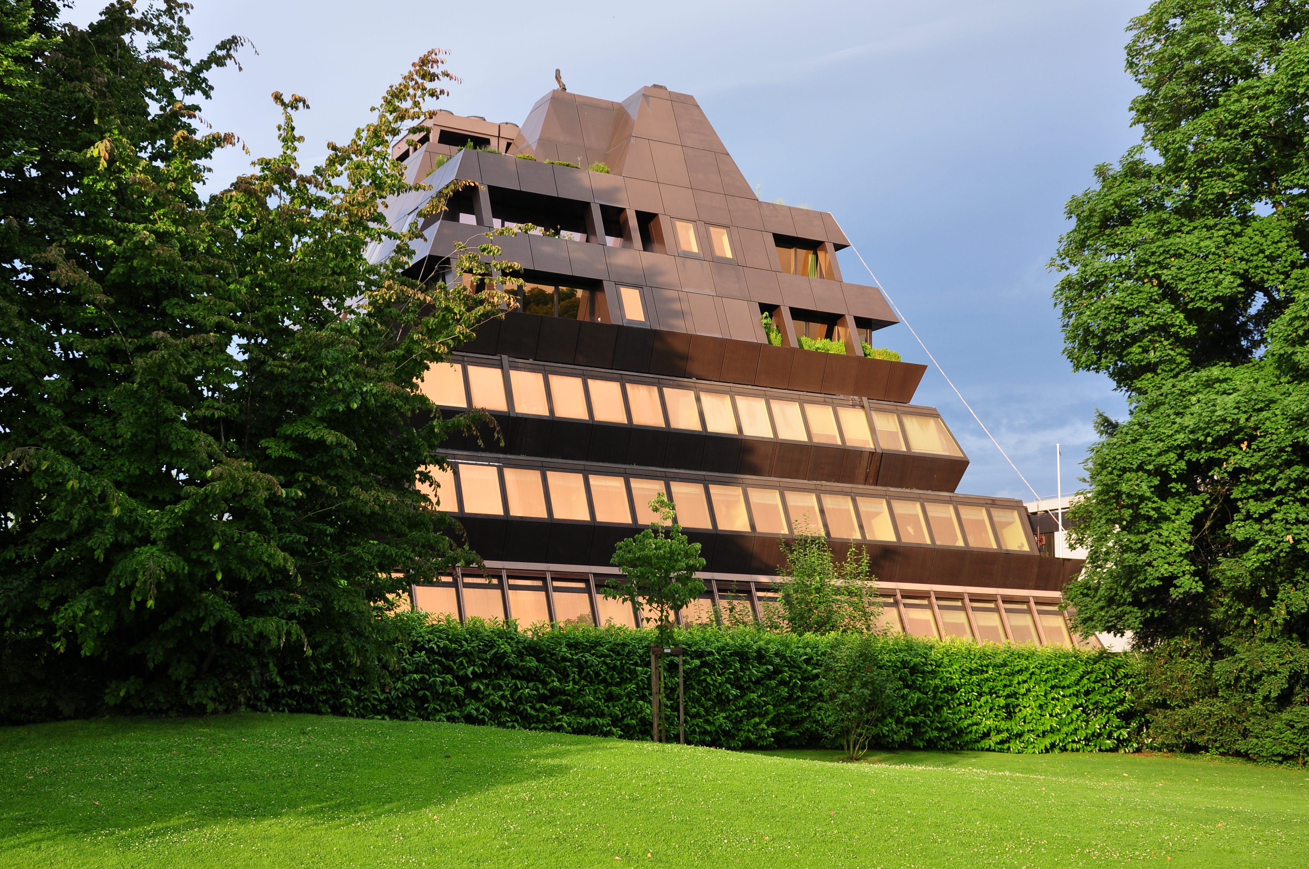 Klinik (hospital) Pyramide in Zürich-Seefeld (Switzerland)